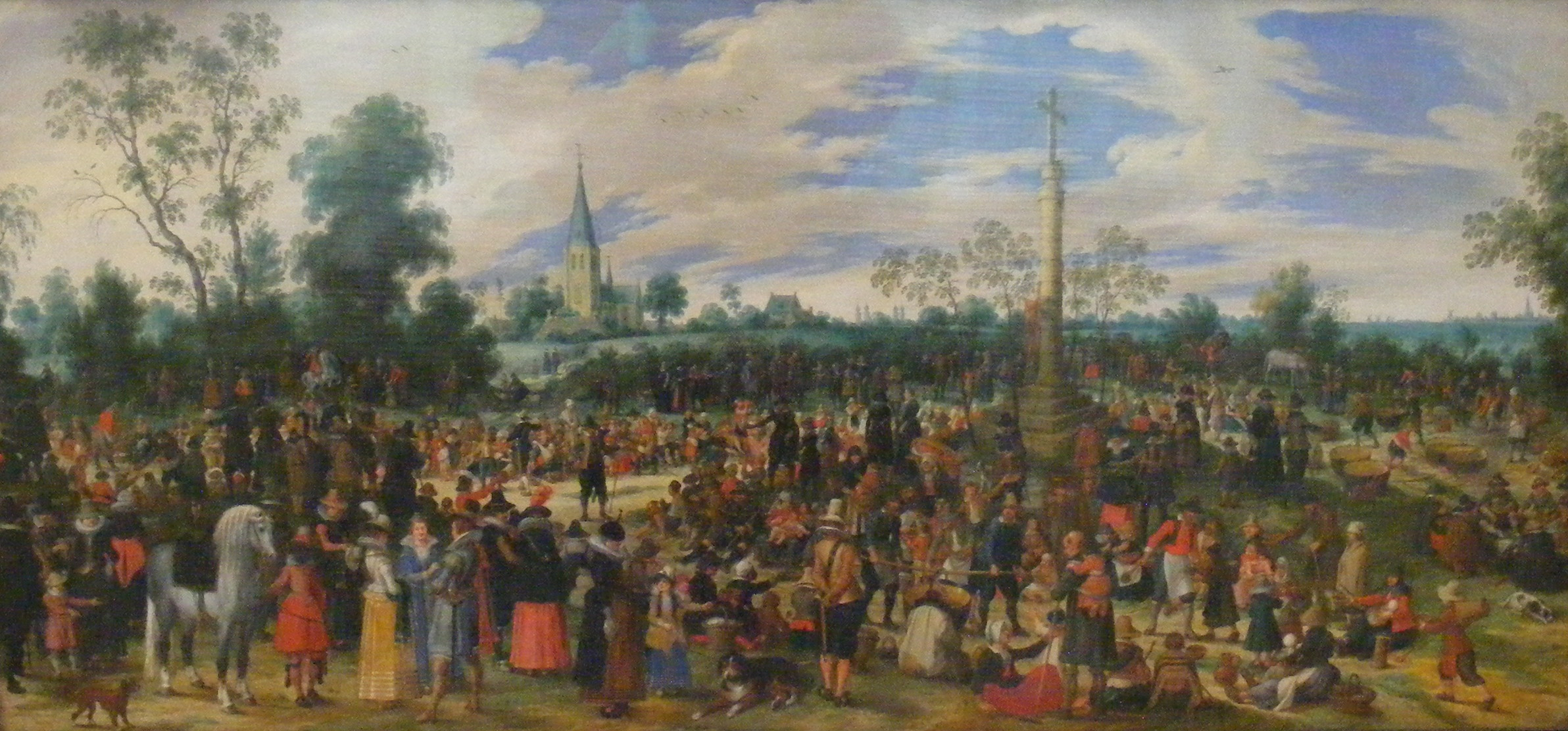 Wallfahrer bei einer Stadtlabel QS:Lde,"Wallfahrer bei einer Stadt"